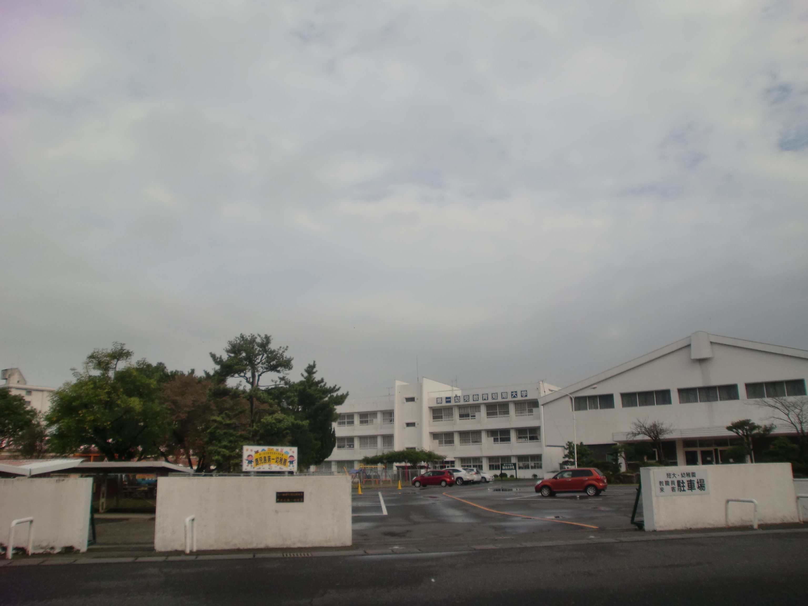 第一幼児教育短期大学の外観。